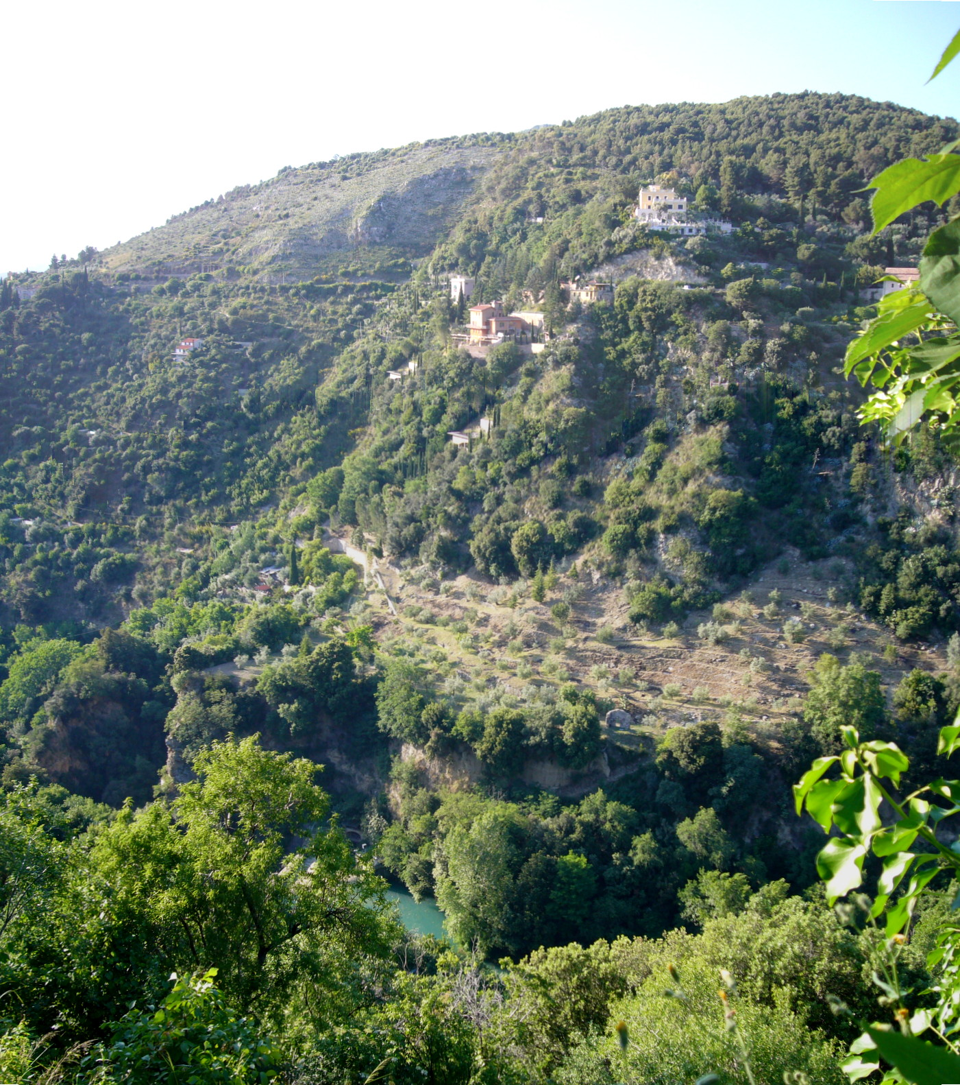 Tivoli: la valle dell'Aniene sotto la grande cascata